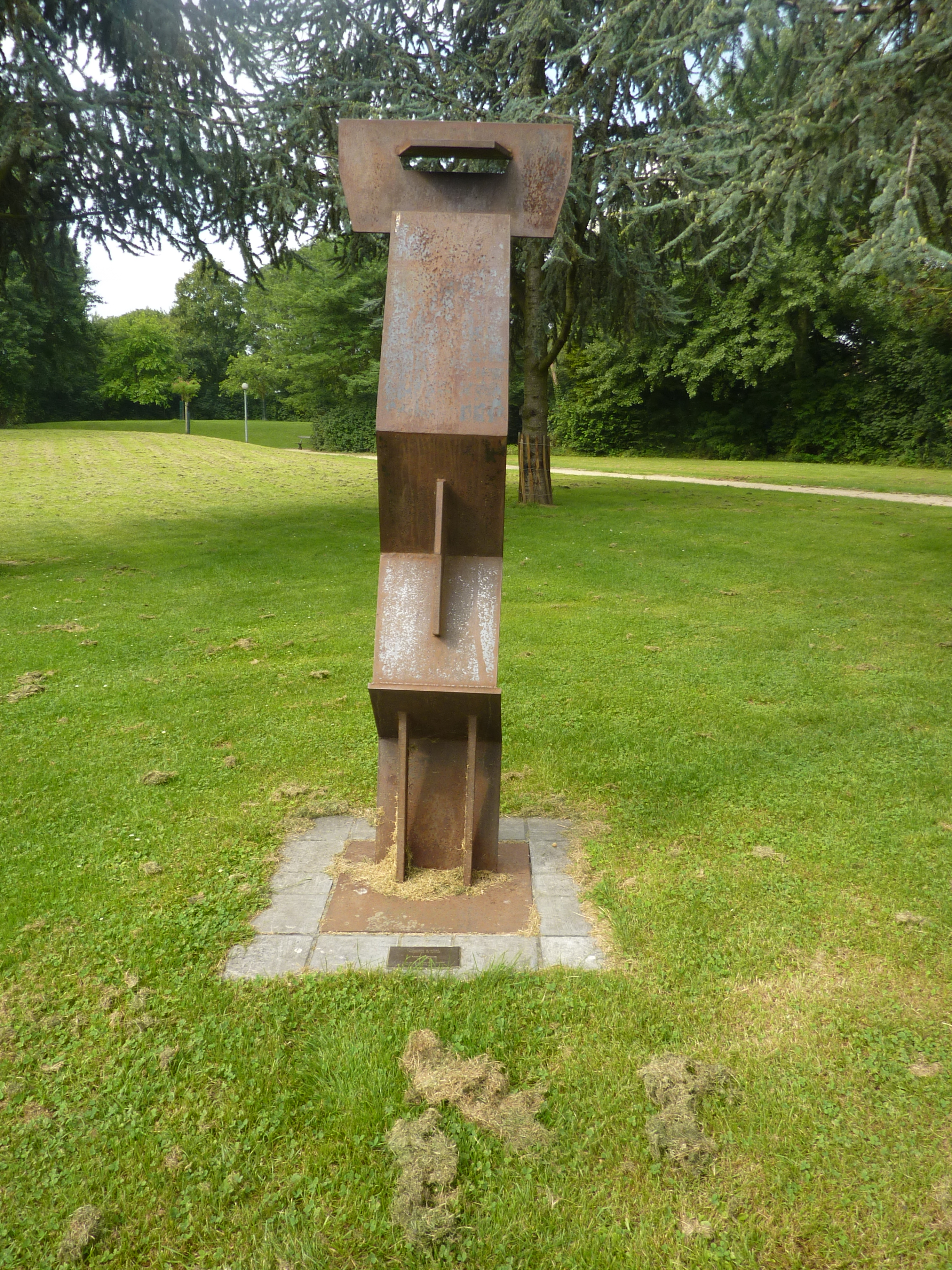 Polyphème le cyclope par André Willequet au parc Meudon à Neder-Over-Heembeek à Bruxelles, Belgique.